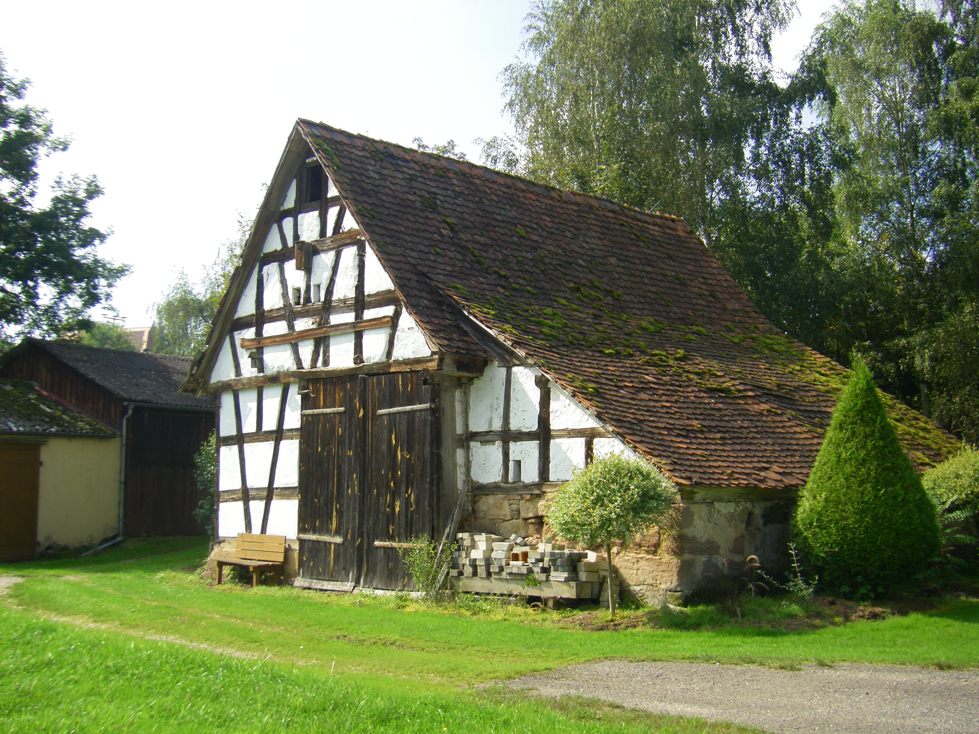 Baudenkmal; alte Scheune; Geichsenmühle 27; Neuendettelsau